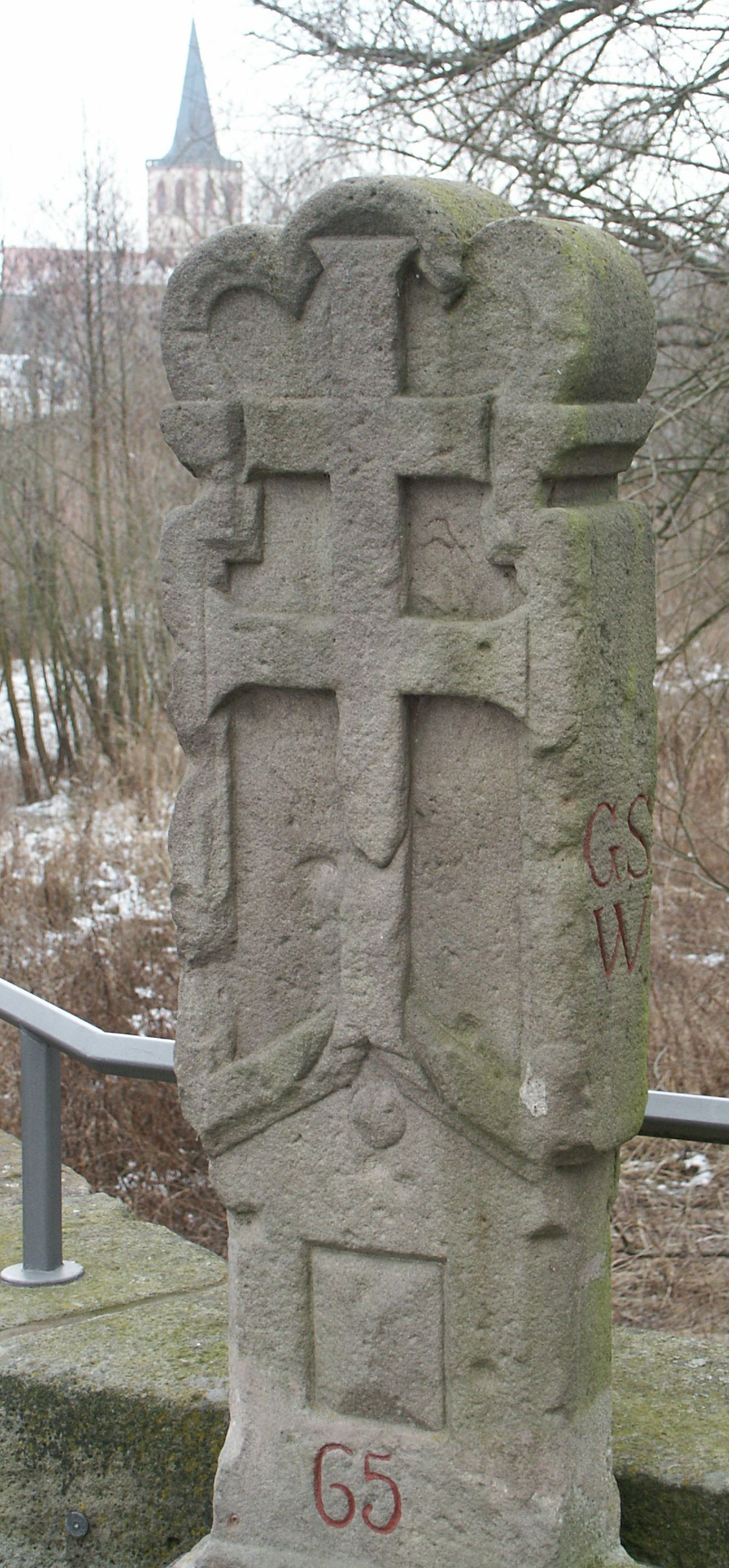 Grenzstein der Abtei Hersfeld an der alten Werrabrücke zwischen Philippsthal und Vacha. Im Hintergrund ist eine Kirche in Vacha zu sehen.